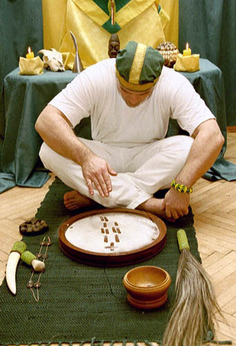 immagine di un babalawo